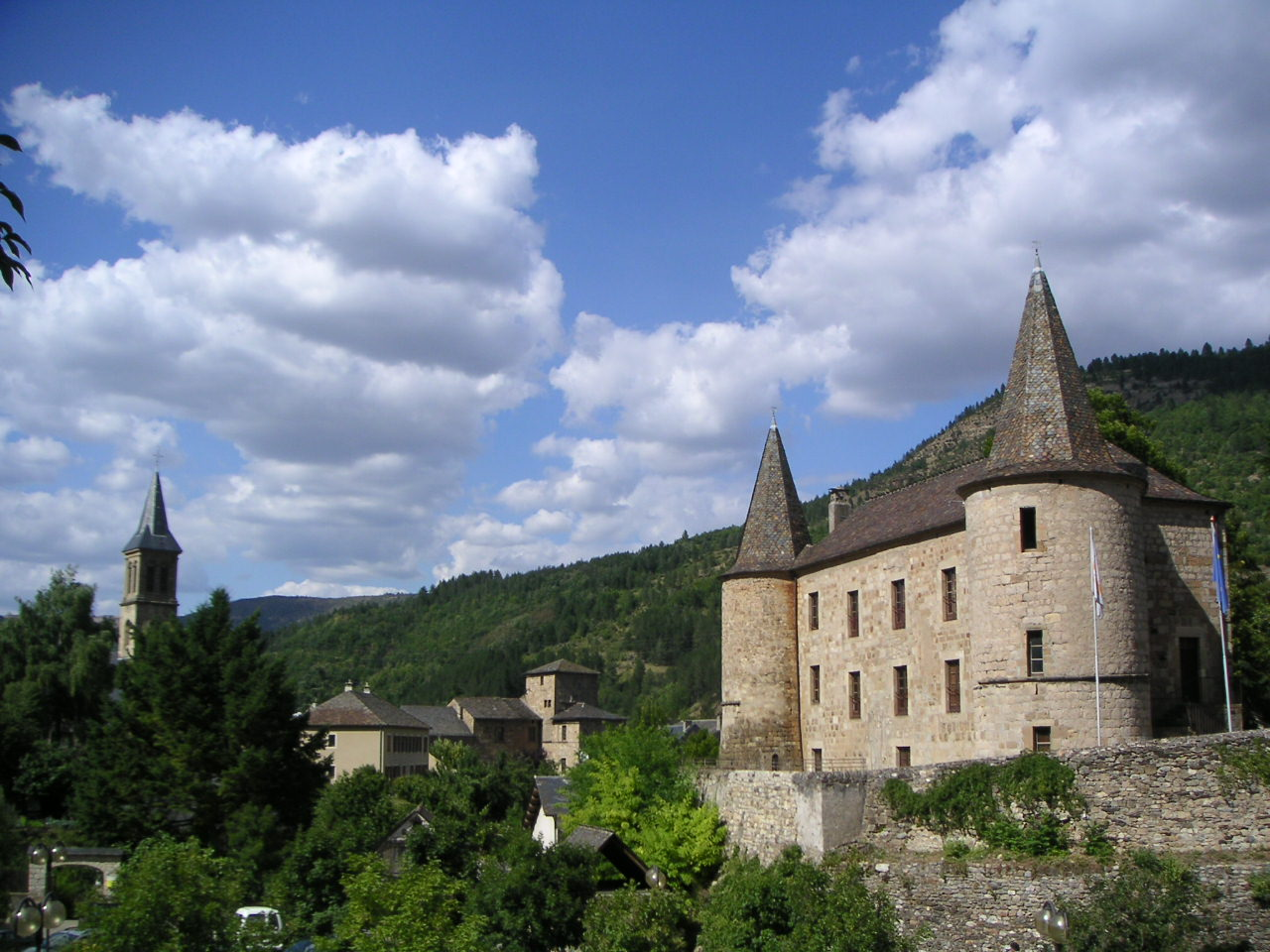 Le Château et l'église de Florac Photo personnelle - TouN - libre de droit Prise le : 12 août 2005